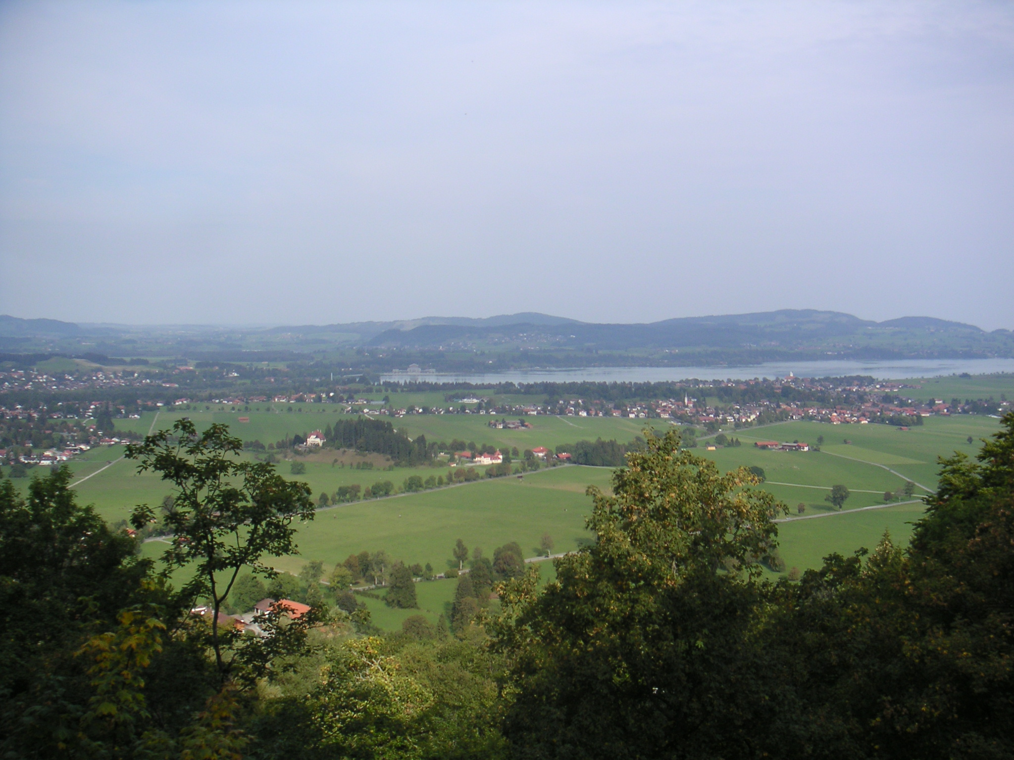 フュッセン遠景